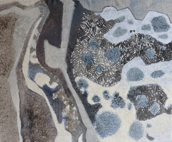 Le Versant, acrylique et sable sur toile